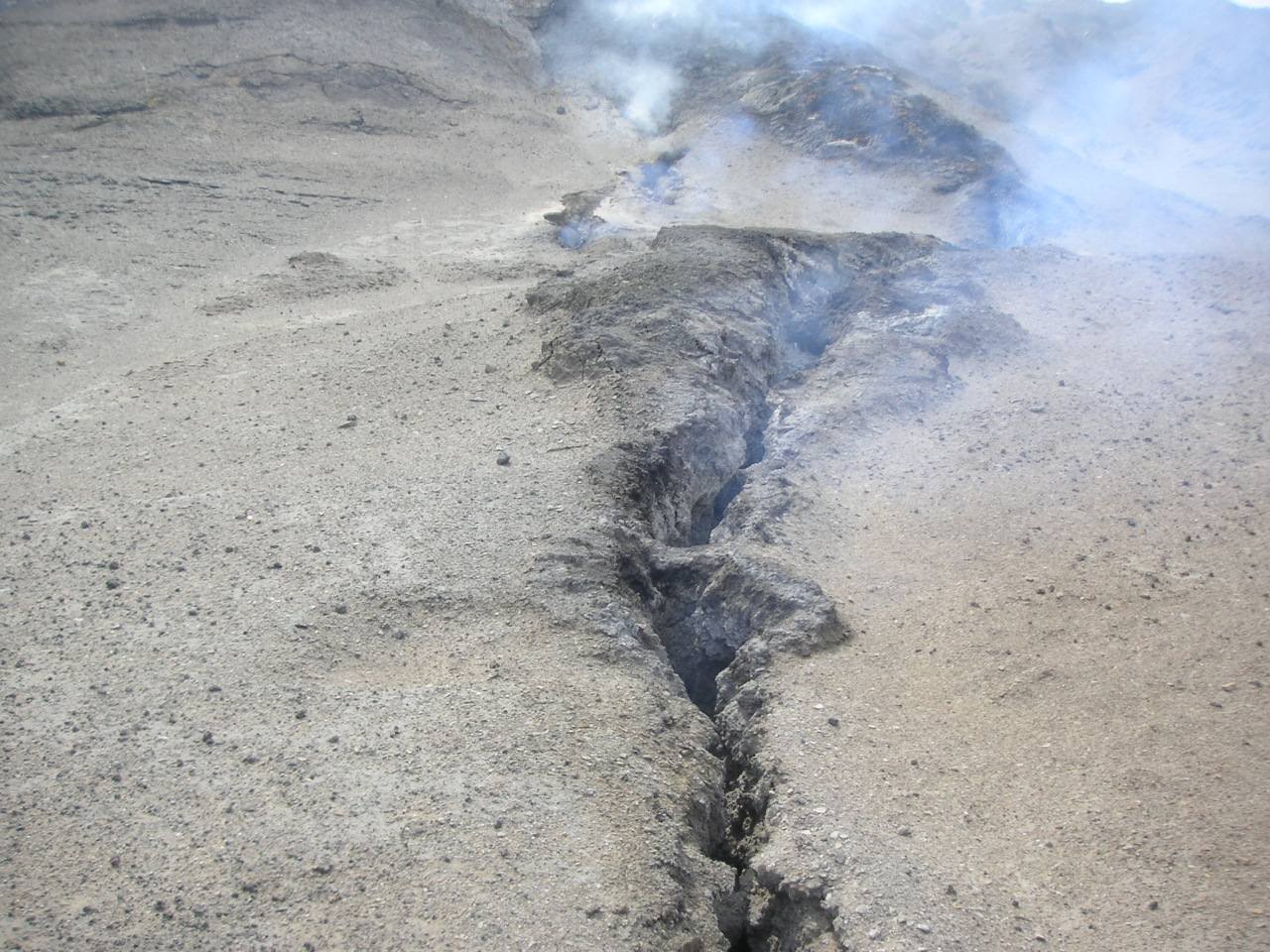 Spalte über einem Kohlebrand in China.